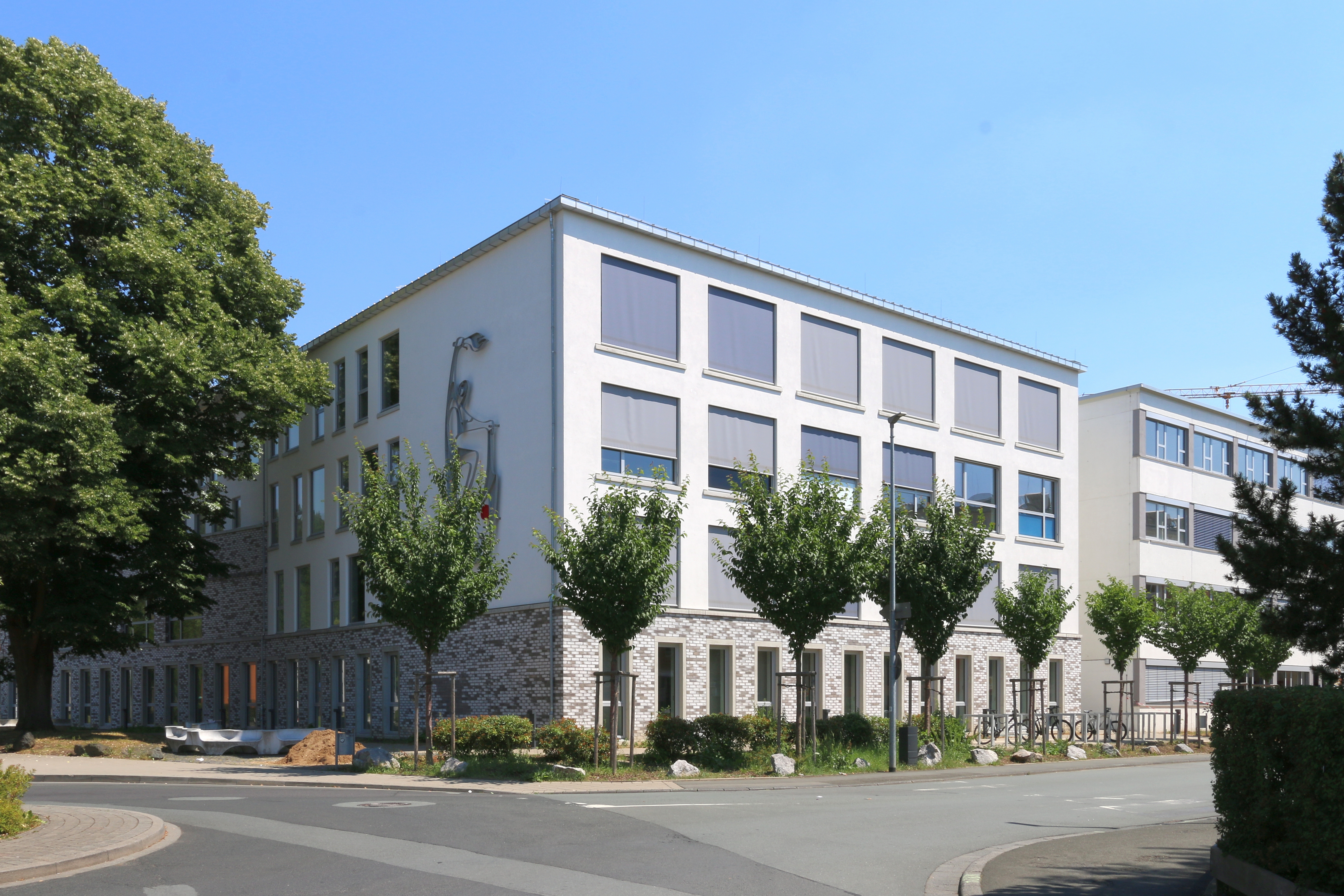 Herborn, Lahn-Dill-Kreis: Gymnasium Johanneum